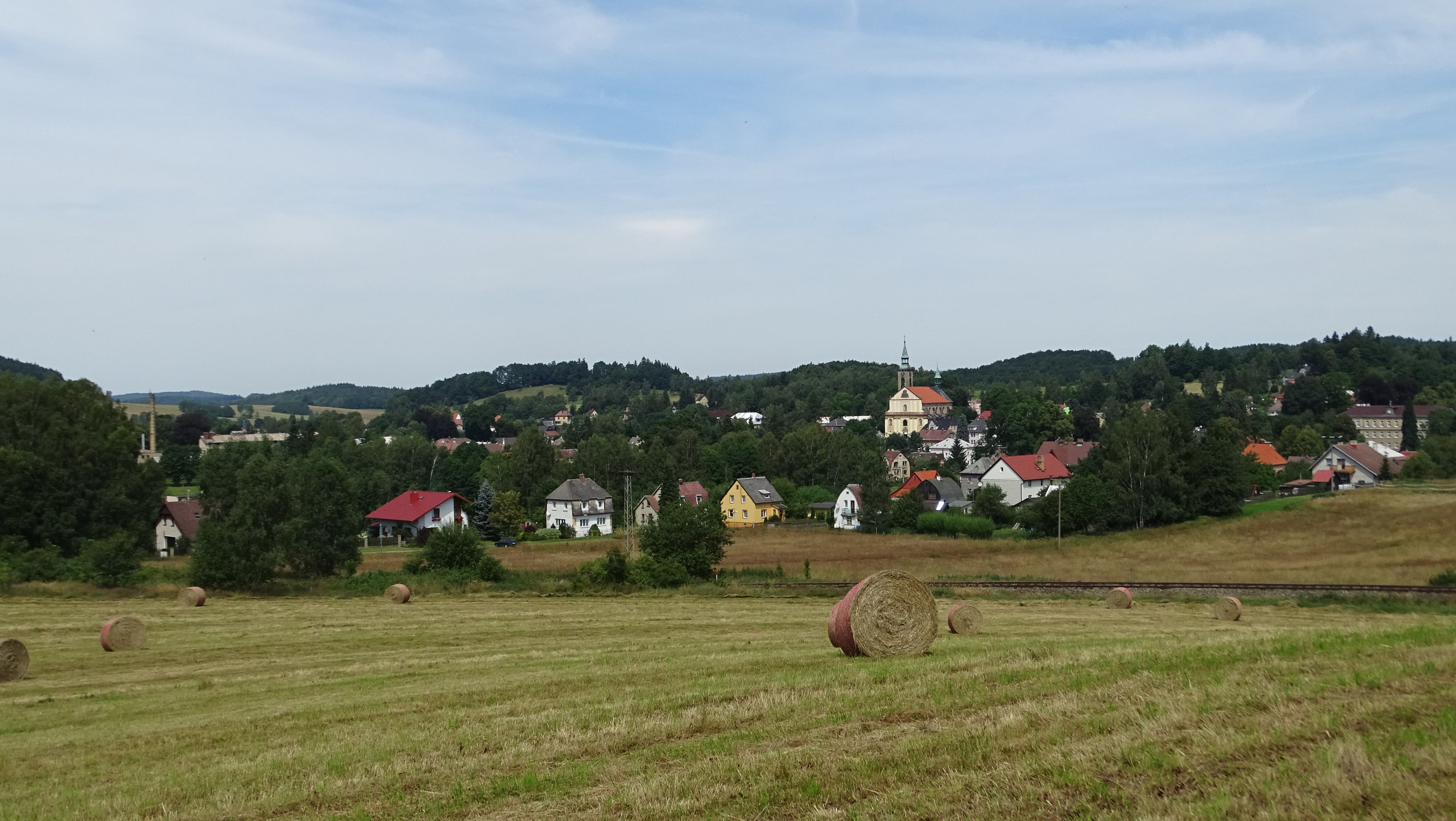 Nixdorf vom Freibad aus gesehen